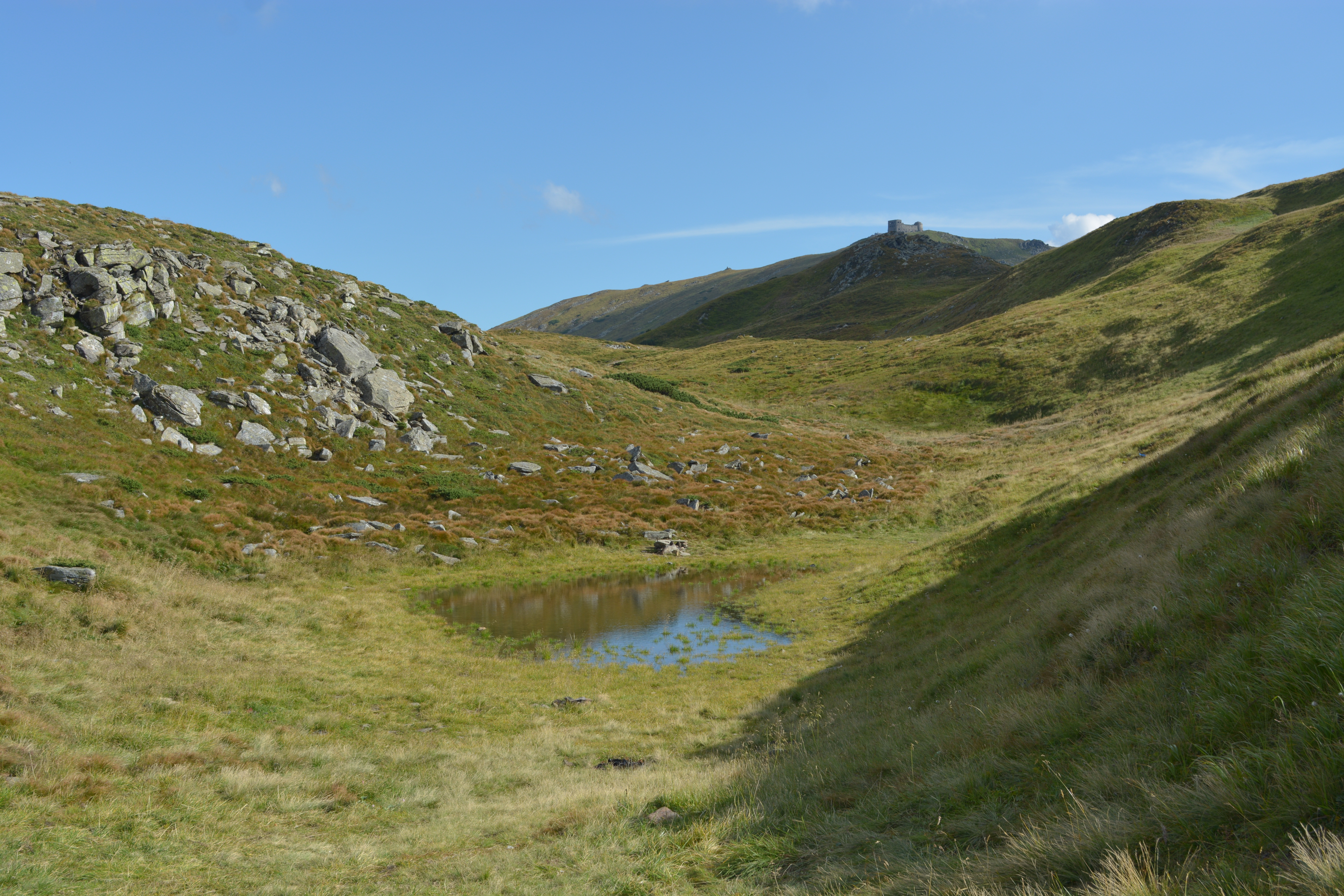 Озерце Нявчин Перстень, вид з півночі в напрямку на вершину Піп-Іван